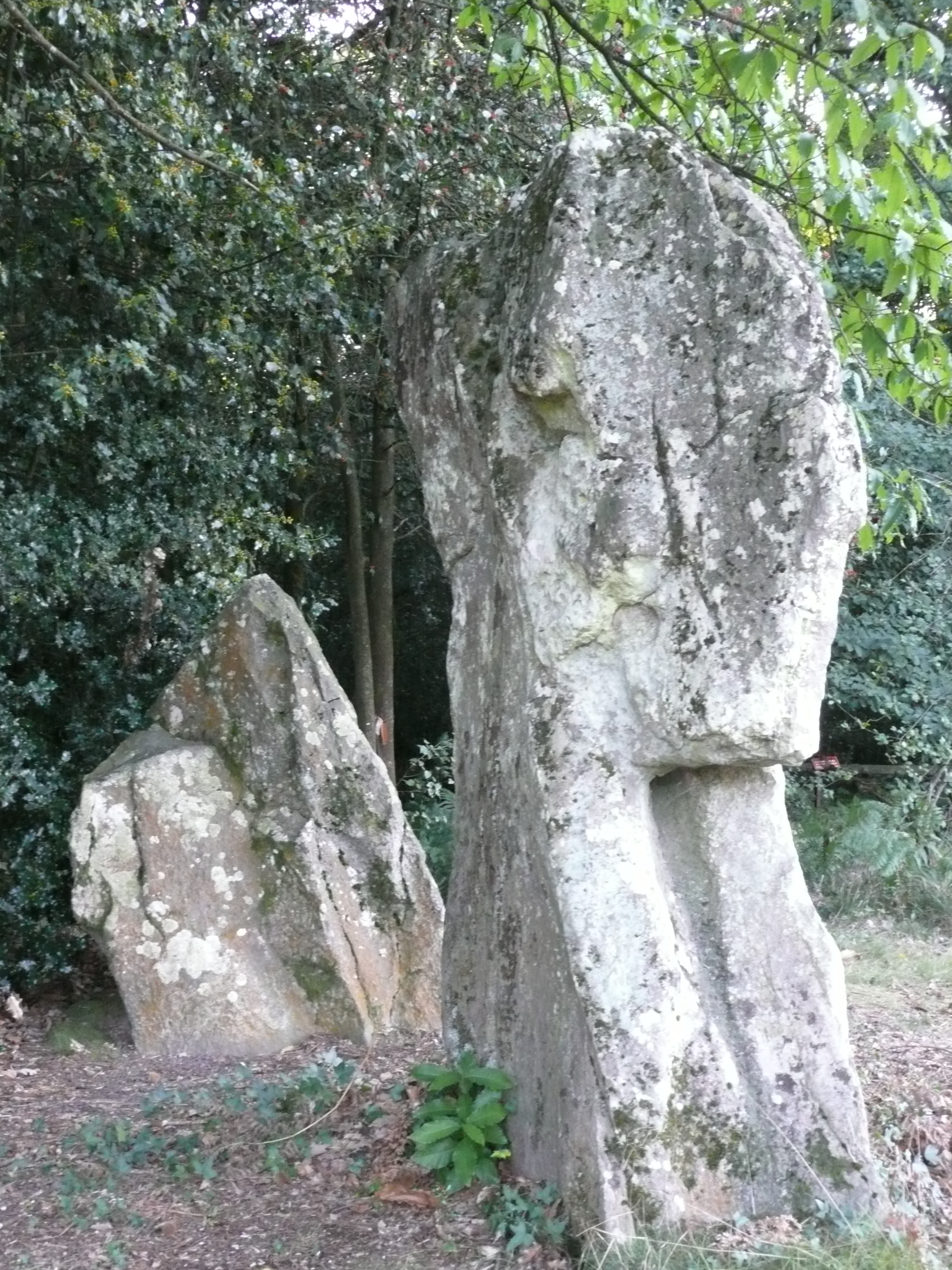 Echemiré - Menhirs .